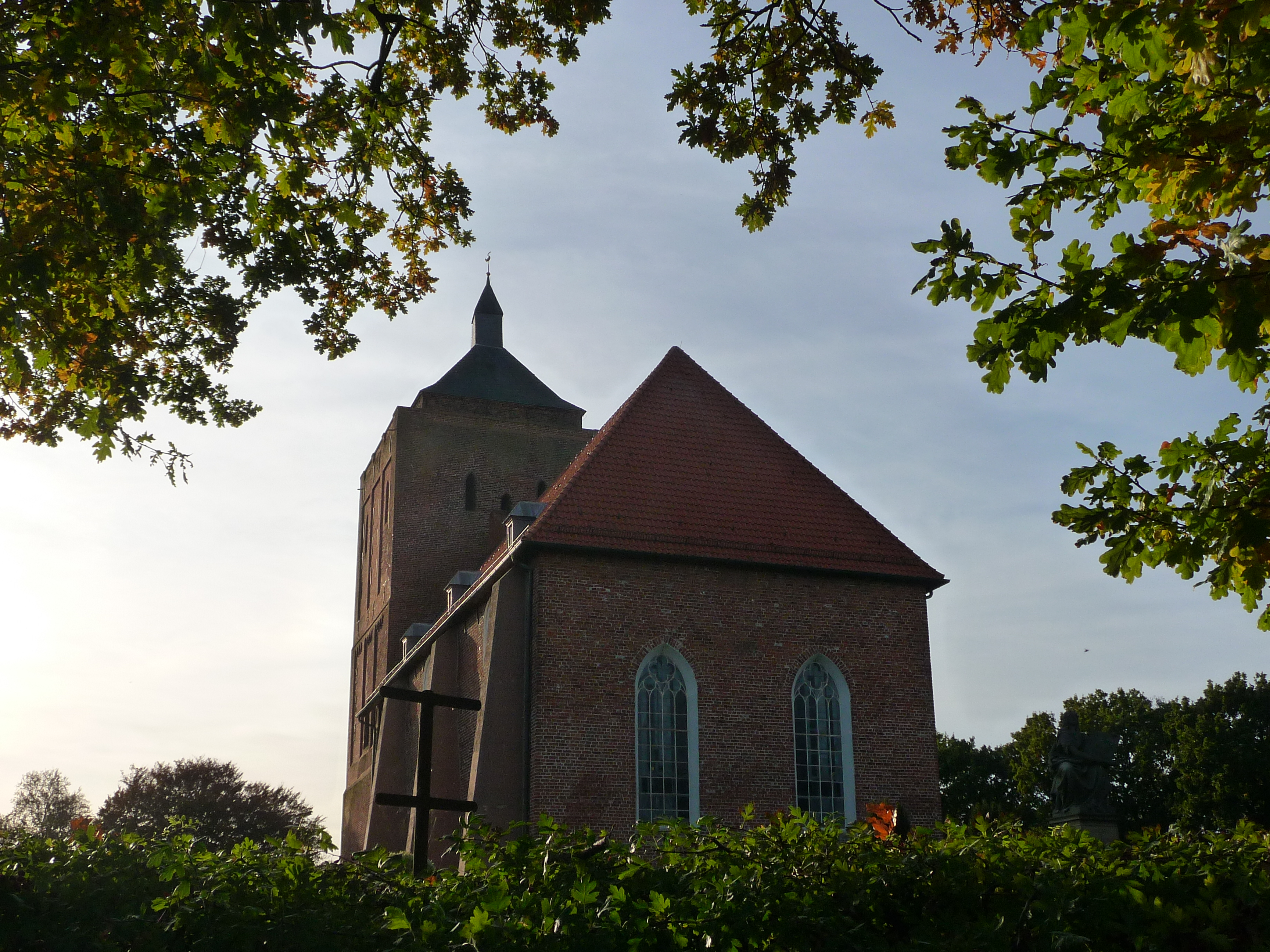 Warnfriedkirche in Osteel (Samtgemeinde Brookmerland, Landkreis Aurich, Ostfriesland, Niedersachsen, Deutschland)